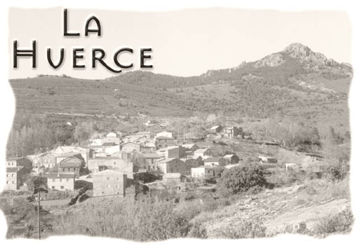 La Huerce